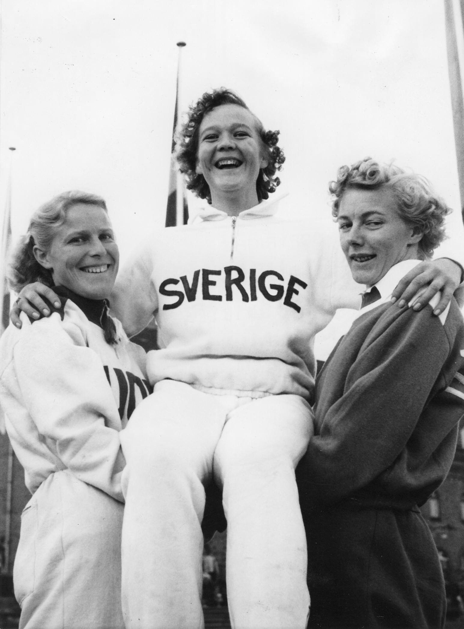 Greta Magnusson (center)